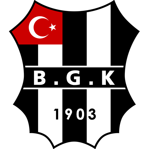 Beşiktaş JK tarafından 1930'larda kullanılan logo. Logodaki kısaltma, kulübün o dönemde kullandığı Beşiktaş Gençlik Kulübü adını temsil etmektedir.